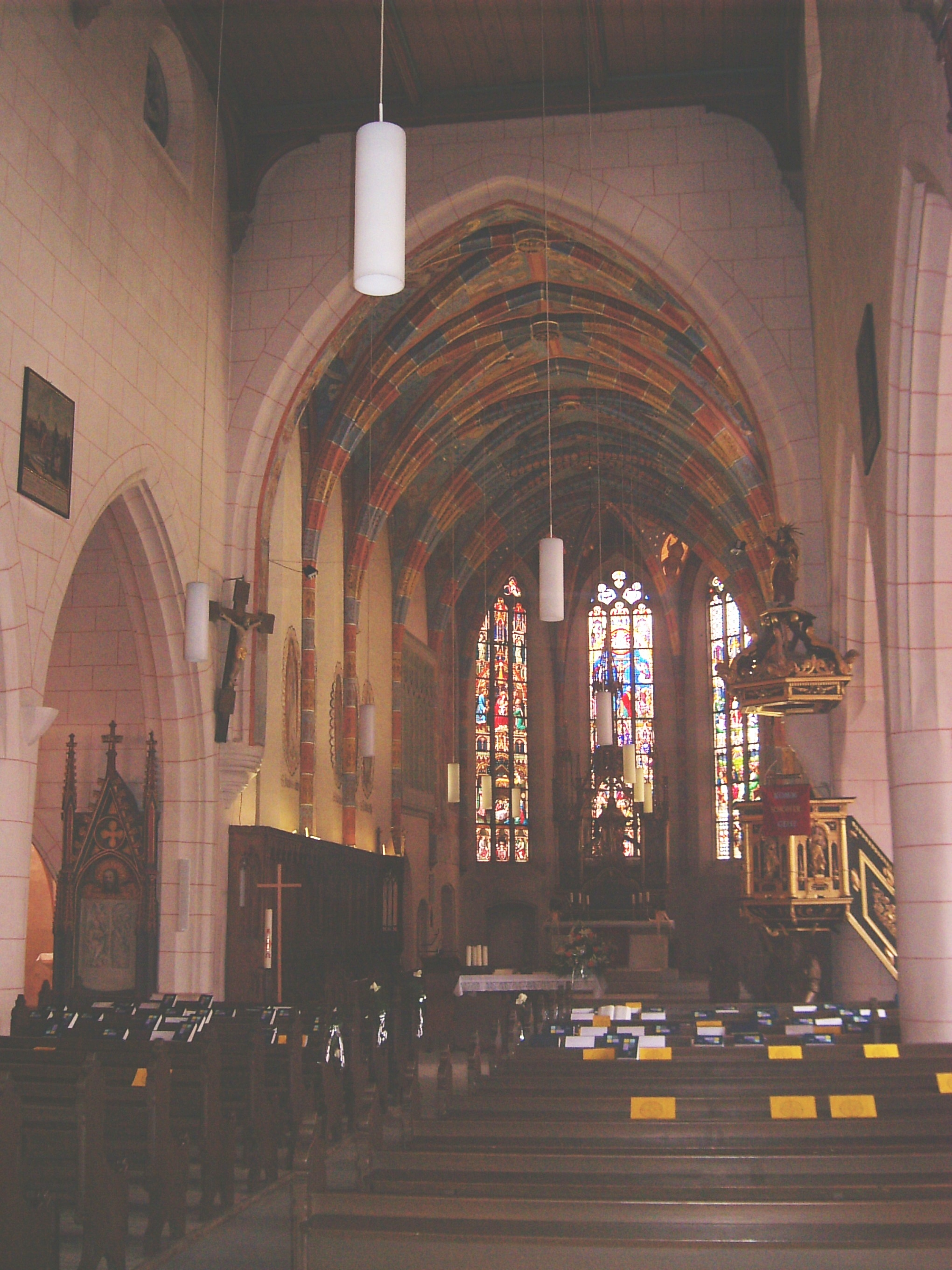 Hauptschiff der evangelischen Stadtkirche Langenzenn Selbst erstellt